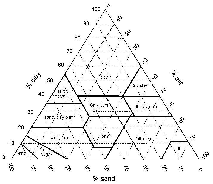 internationaal gebruikte textuurdriehoek